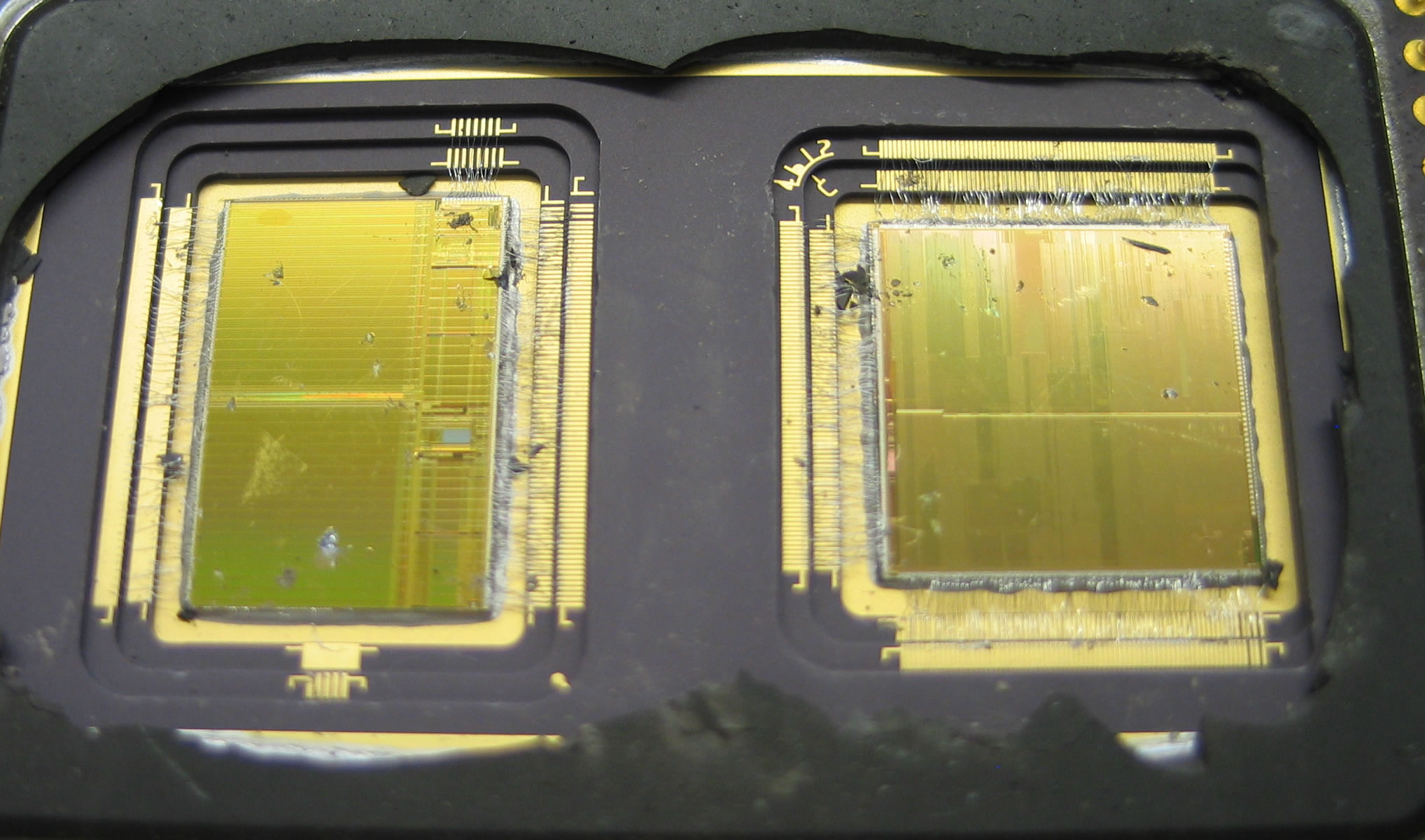 Die eines Pentium Pro 180Mhz, durch das Öffnen etwas lädiert, Funktionseinheiten jedoch gut erkennbar.